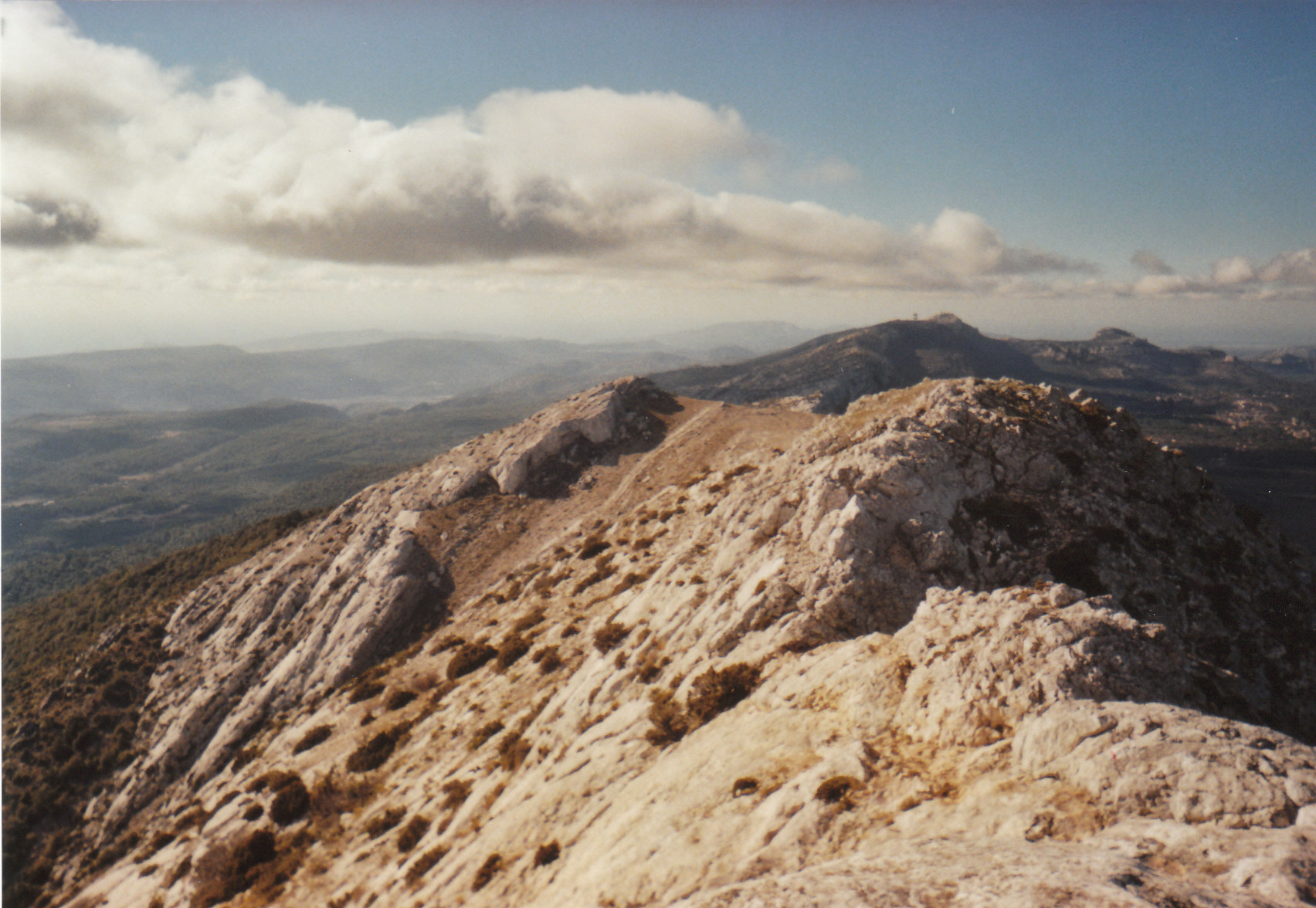 panorama sur les crêtes à l'ouest visible depuis le point-culminant de la Sainte-Baume